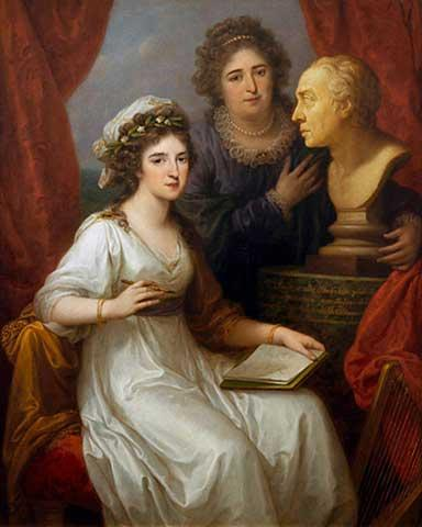 Графиня Анна Александровна Чернышёва (28.05.1739-7.08.1794) с дочерью Екатериной Ивановной Вадковской (1766-после 1826), изображена рисующей портрет своего отца графа И.Г.Чернышёва с мраморного бюста.